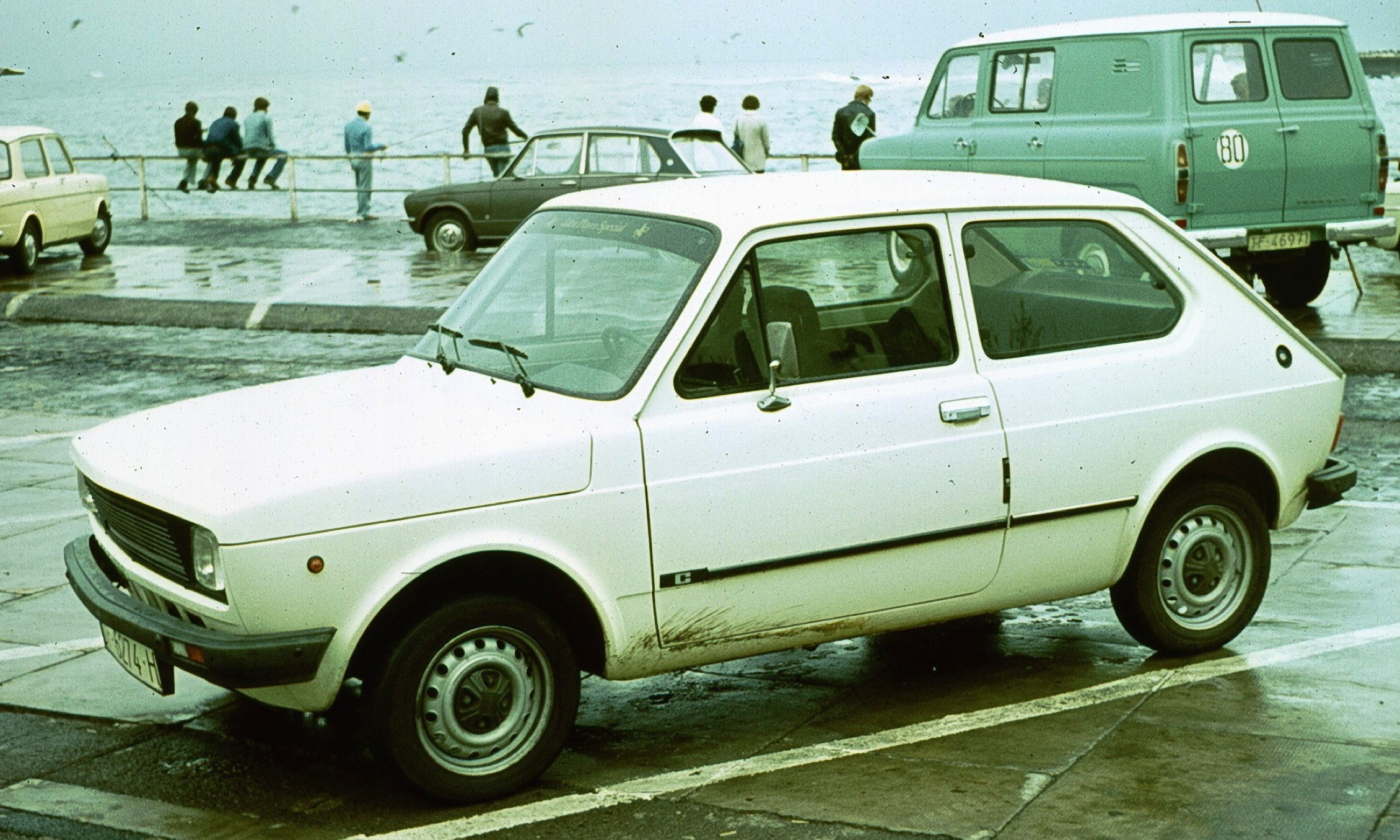 Seat 127 in Tenerife